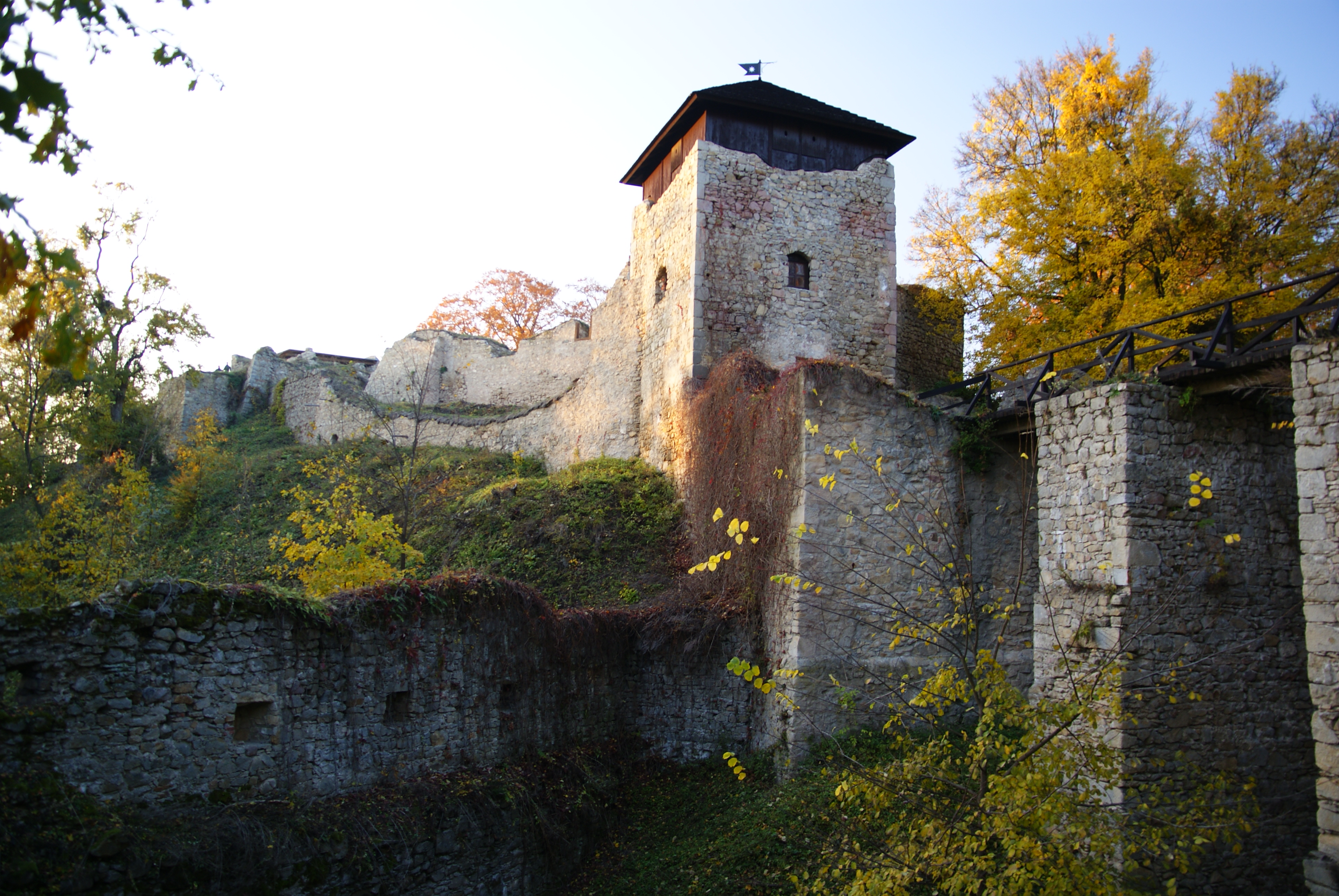 Hrad s předhradím, zřícenina a archeologické stopy (Lukov), Lukov